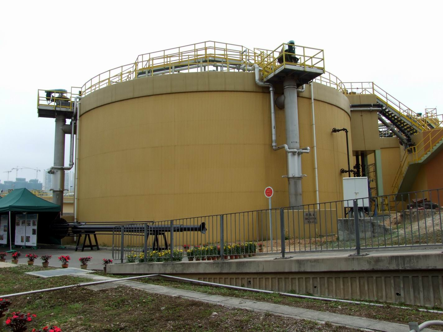 氣提式消化缸